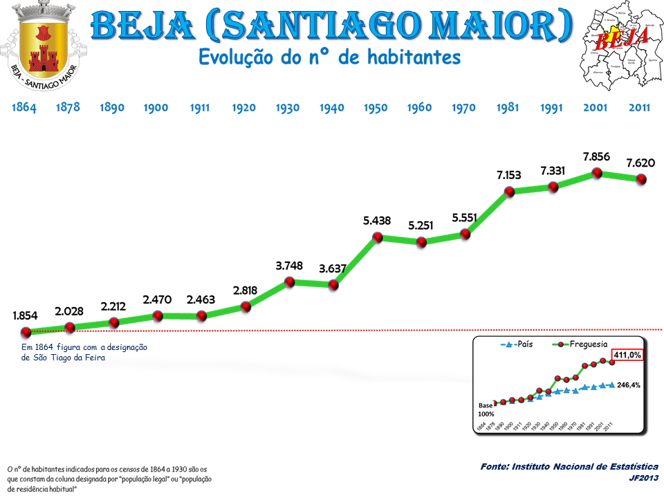 Evolução da População 1864 / 2011